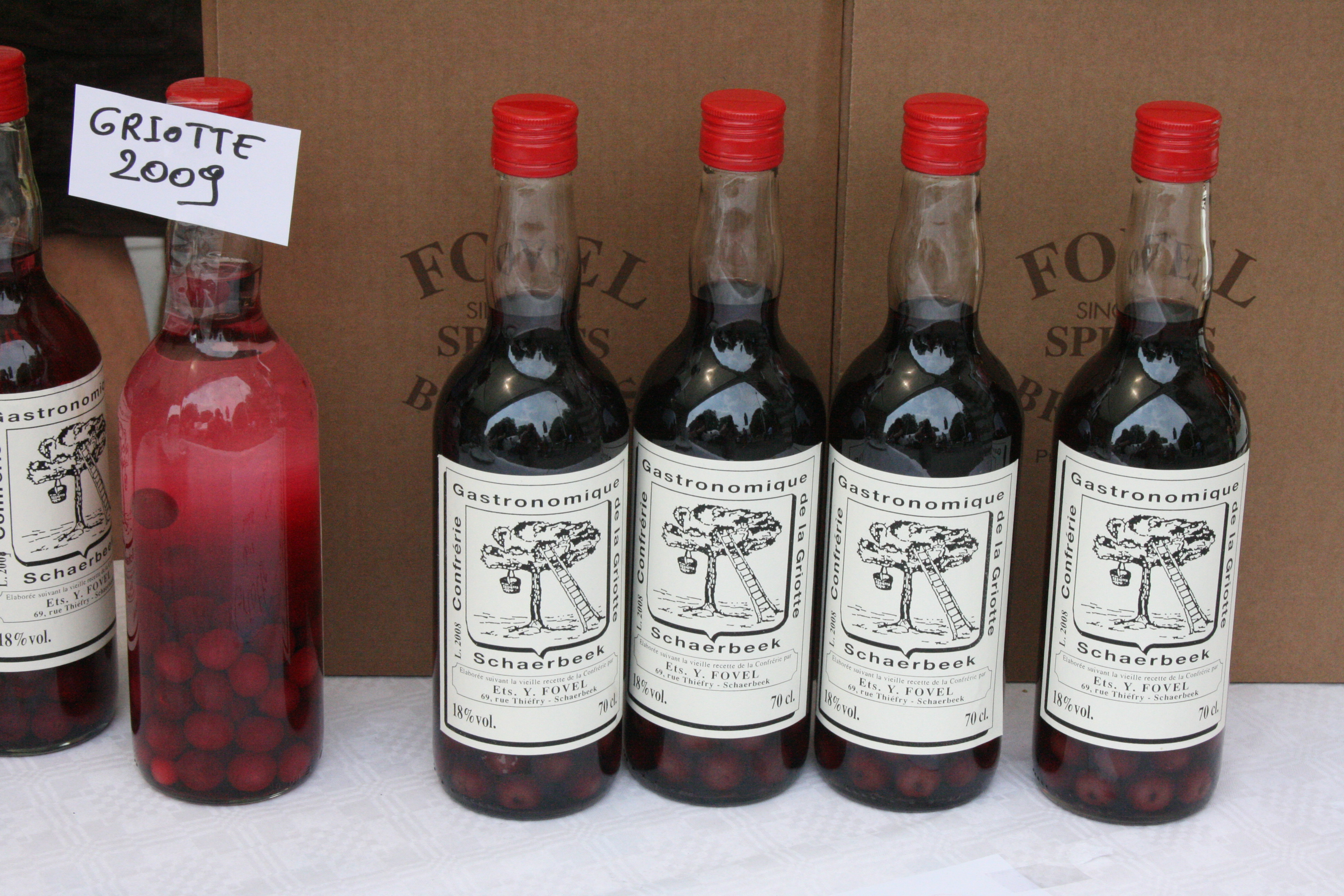 La distillerie Fovel, rue Thiéfry 69, Schaerbeek (Bruxelles) fabrique un genièvre de griottes. Schaerbeek était jadis réputé pour ses cerises